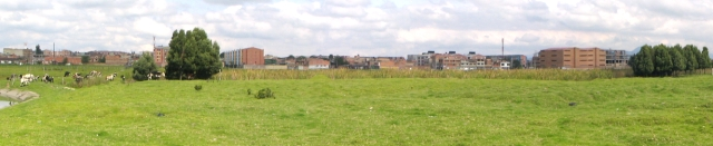 humedal de capellania